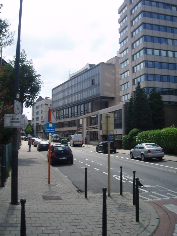 la rue Emile Idiers Auderghem Belgium